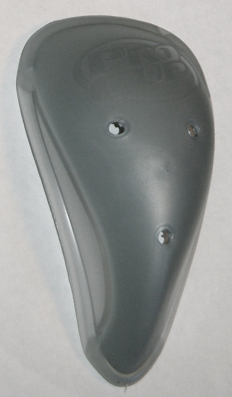 A protective cup